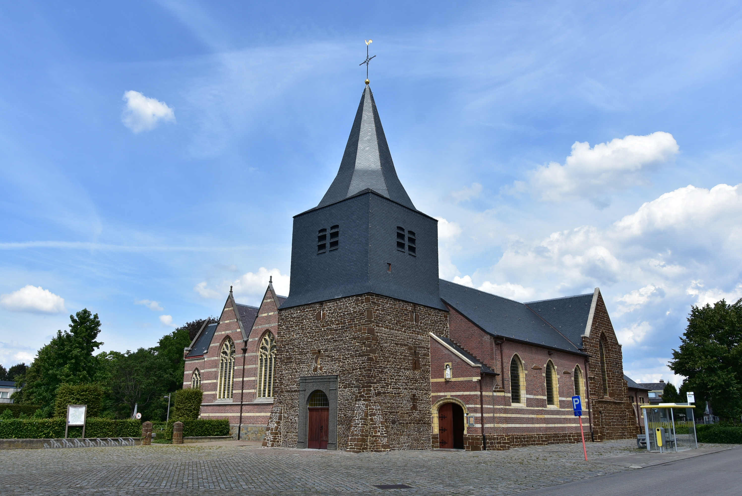 Onze-Lieve-Vrouw-Geboortekerk (Oostham) (21825) 3-08-2020 13-28-42